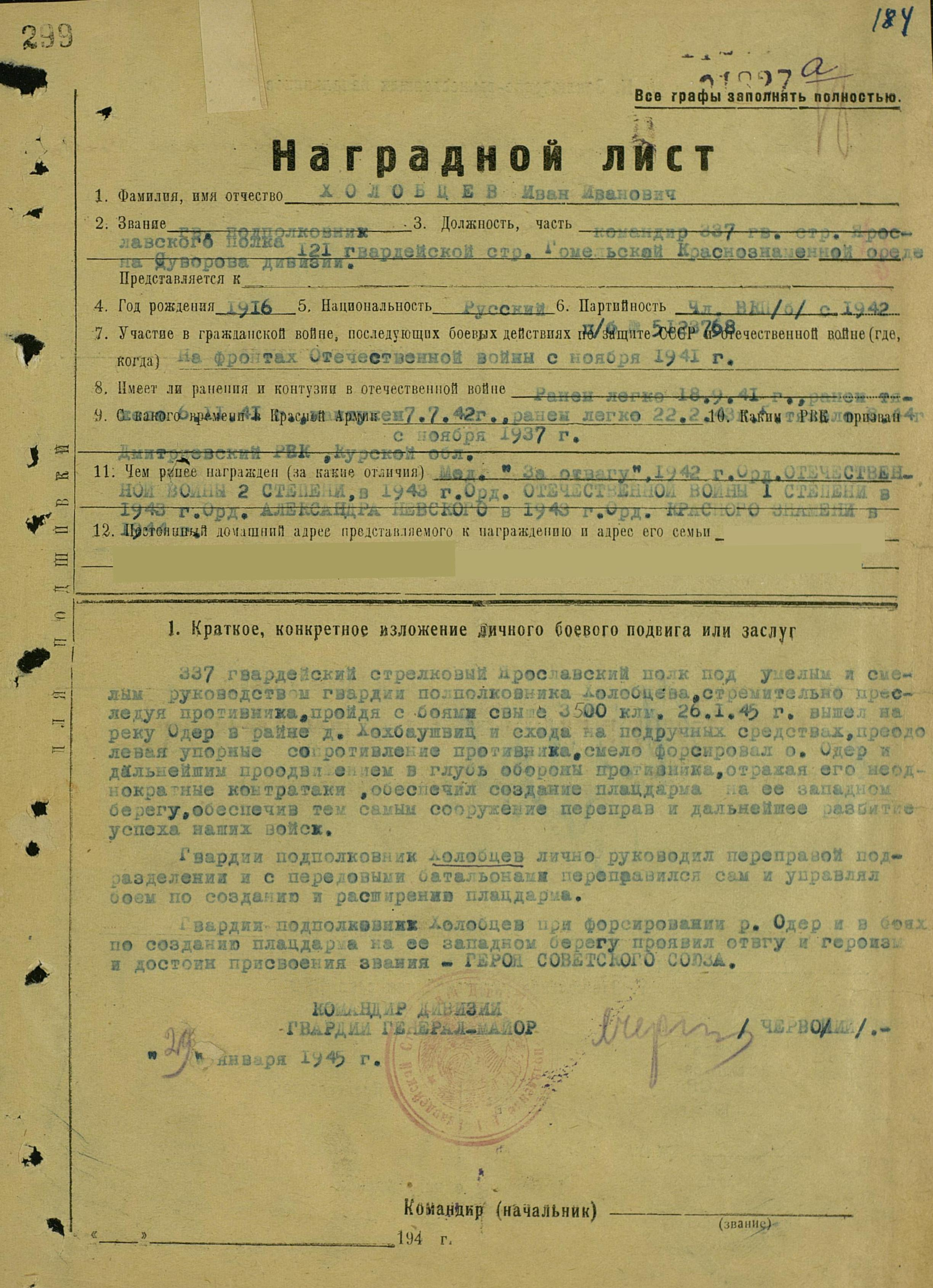 Представление подполковника РККА Ивана Холобцева к званию Героя Советского Союза.